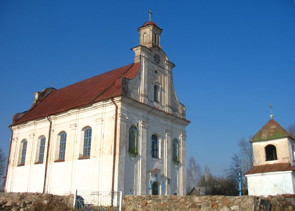 Беларуская (тарашкевіца): Бусяж